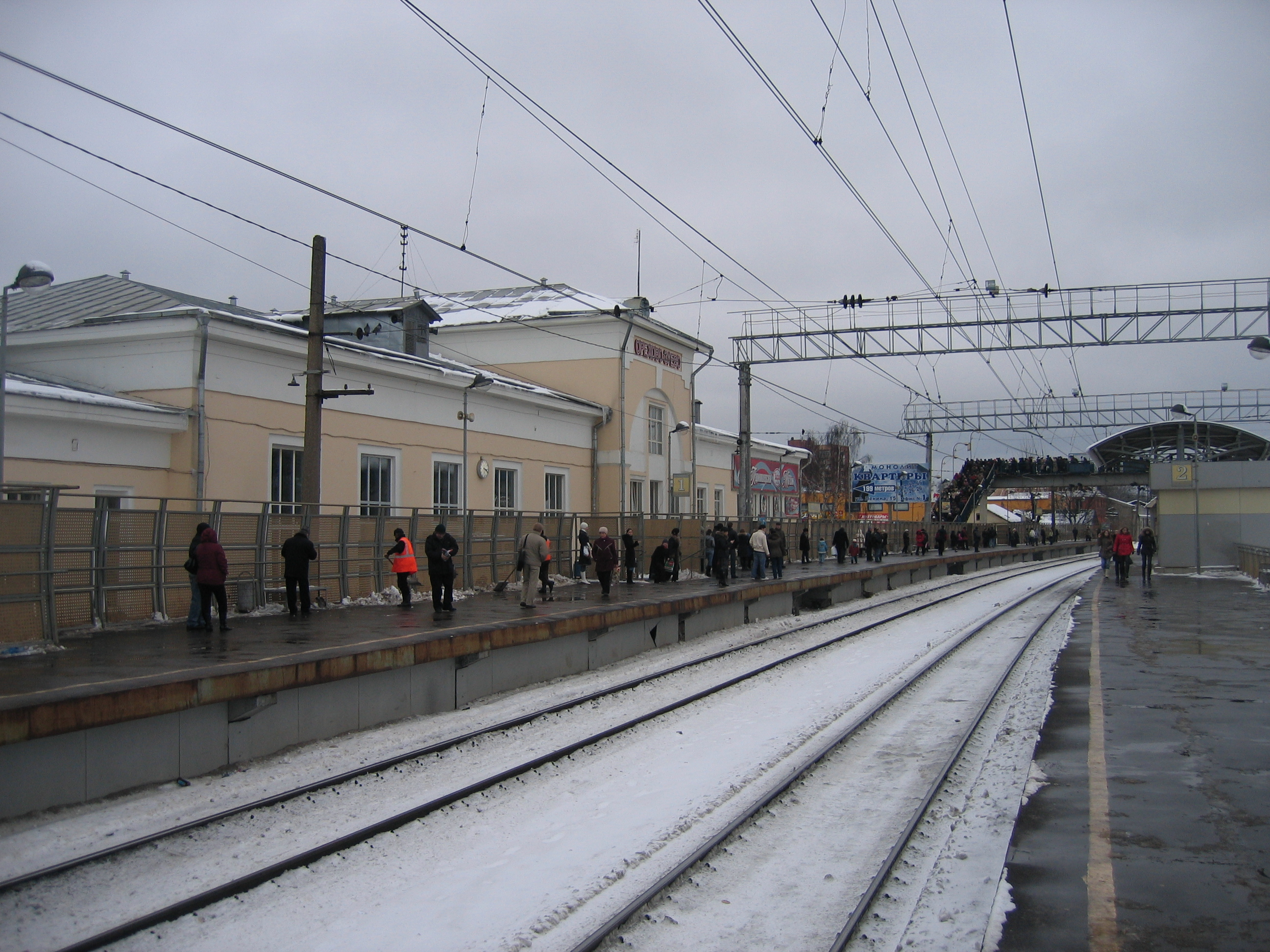 Bahnhof in Orechowo-Sujewo, Russland